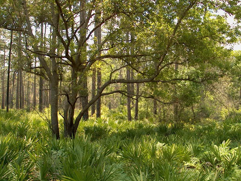 Canal Diggers Trail in Okefenokee Swamp